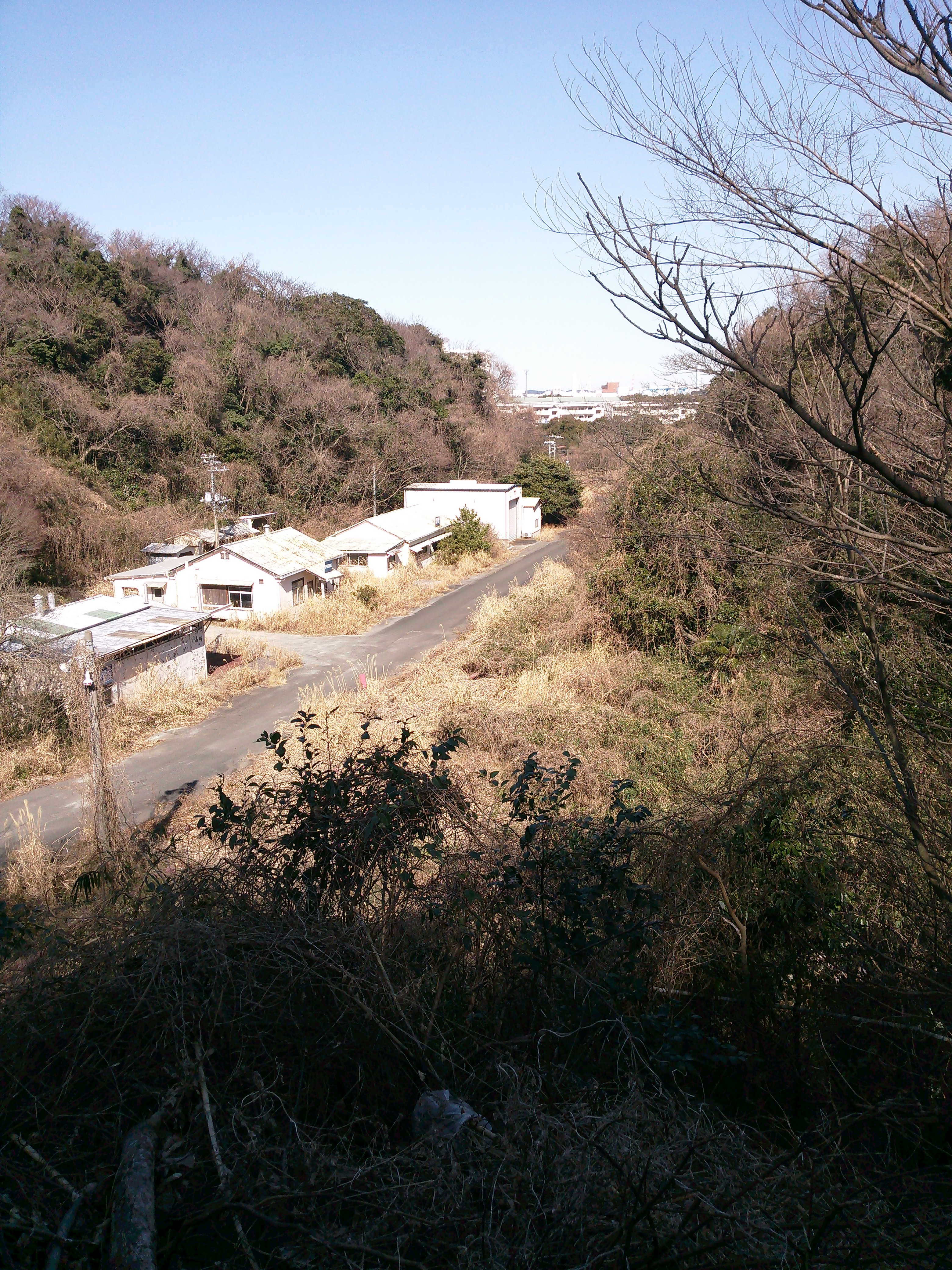 横浜市金沢区、小柴貯油施設。公道より撮影。